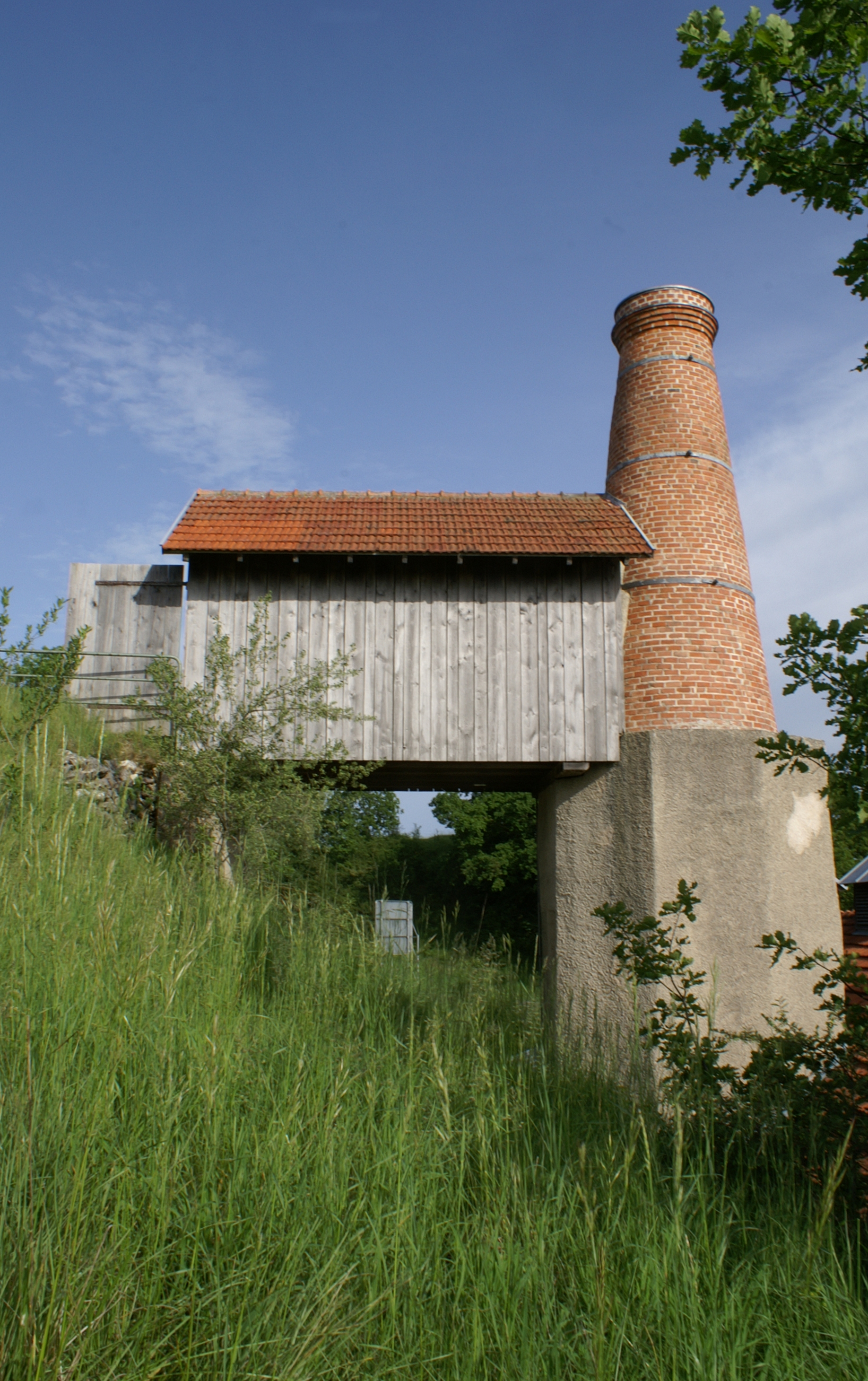 Der Kalkofen in Untermarchtal im Alb-Donau-Kreis wurde 1922 zur Herstellung von Schwarz- und Weißkalk errichtet und war bis 1939 in Betrieb. Heute veranschaulicht die vollständig erhaltene Anlage als Museum die verschiedenen Phasen der damaligen Kalkproduktion.